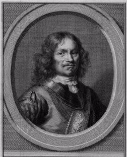 Jacob Houbraken. Portrait of Jan van Galen [detail]. 1725-1780. copper engraving.